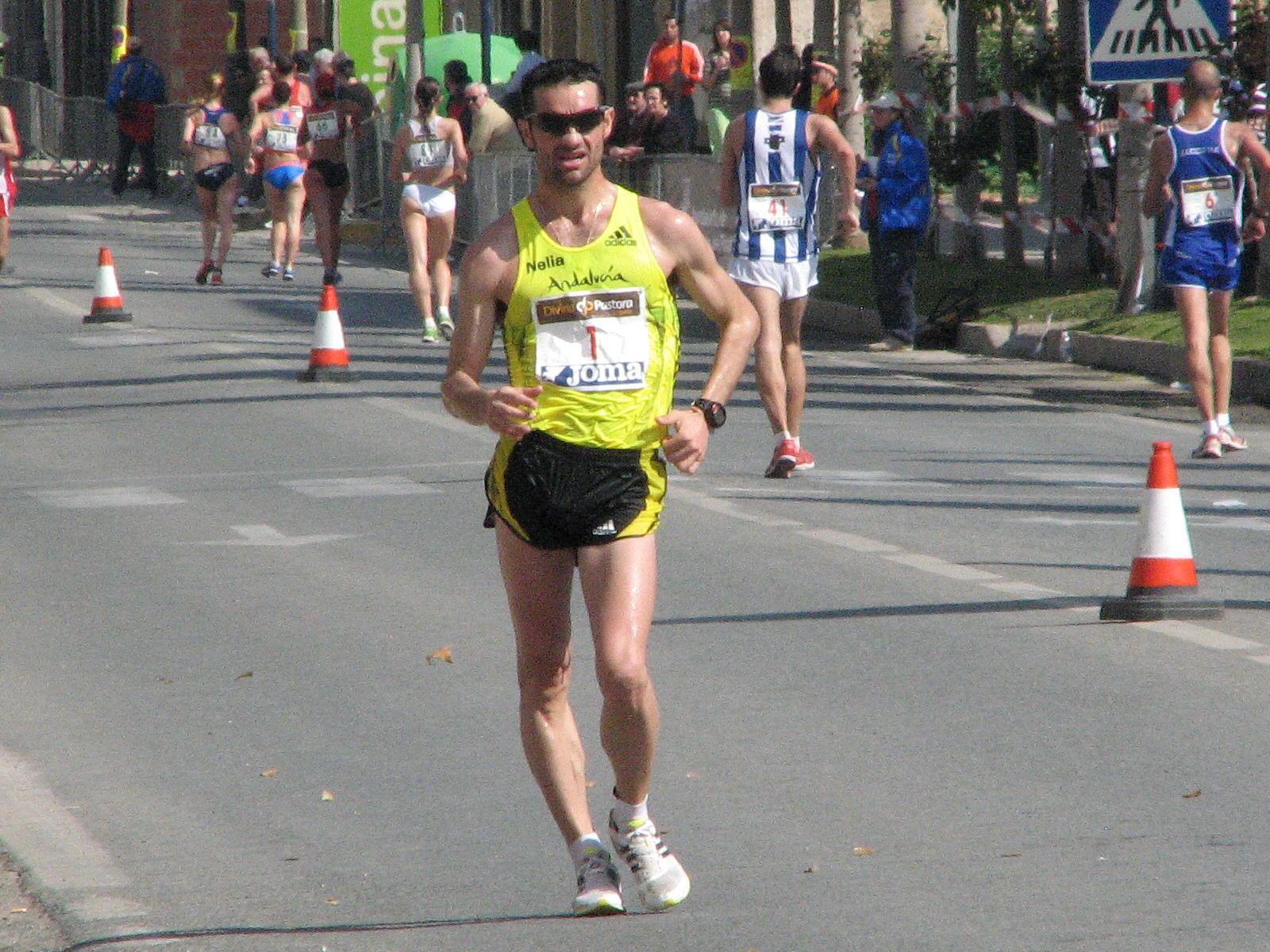 Carrera Paquillo Fernández 1